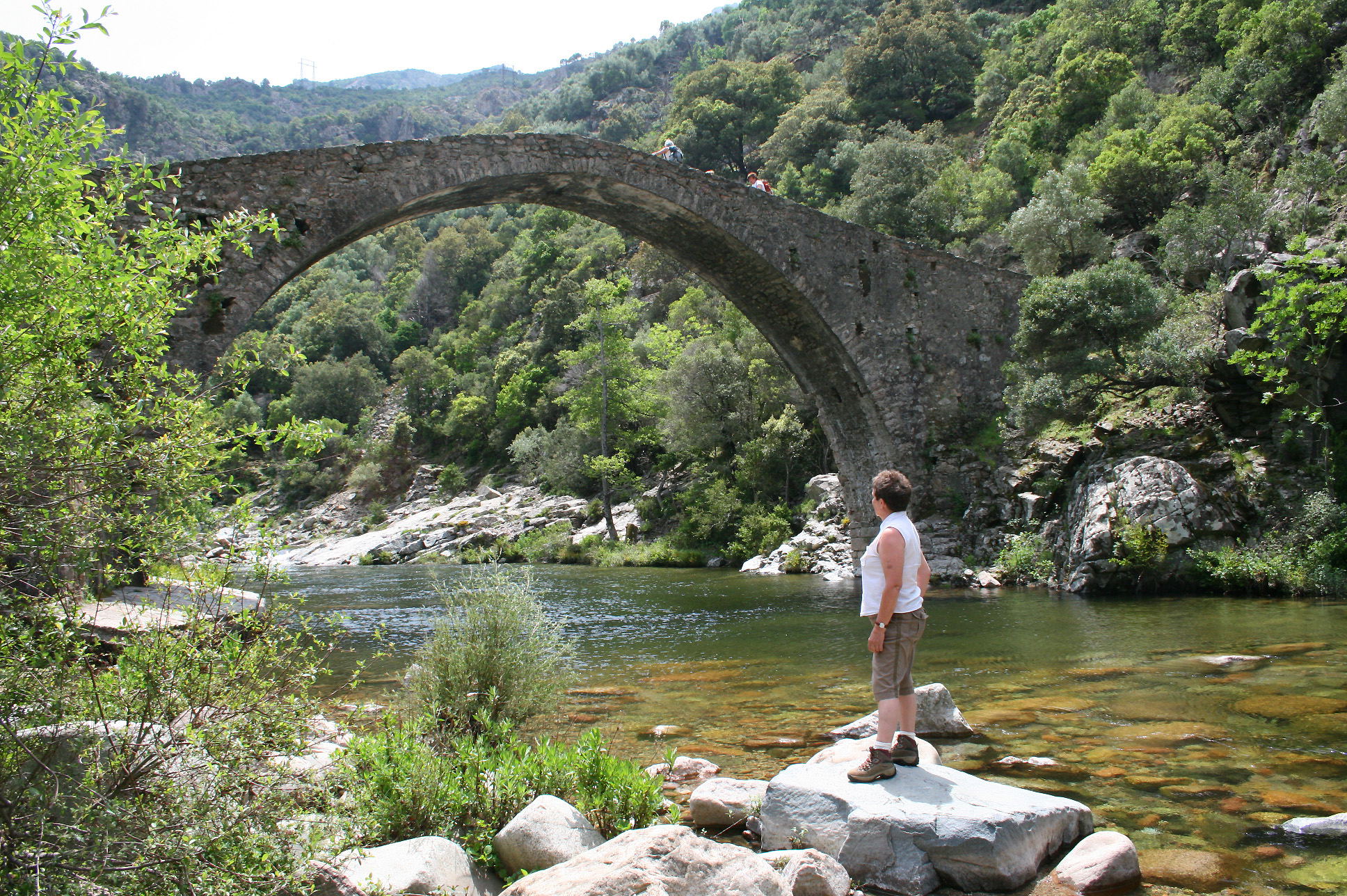 Ota (Corse-du-Sud) - France , le pont génois. Corsu: Ota Francia (Corsica suttana), u ponte genovese.